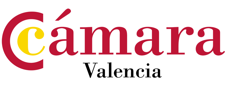 Logotipo de la Cámara Oficial de Comercio, Industria, Servicios y Navegación de Valencia